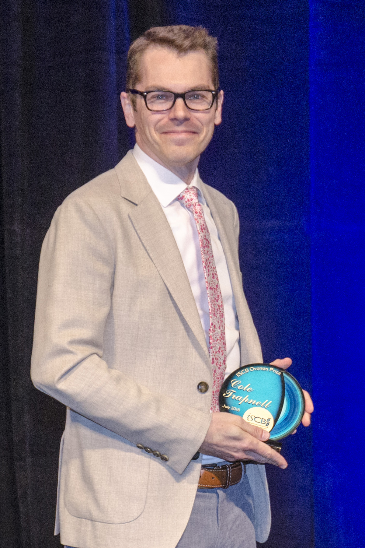 Cole Trapnell at ISMB 2018